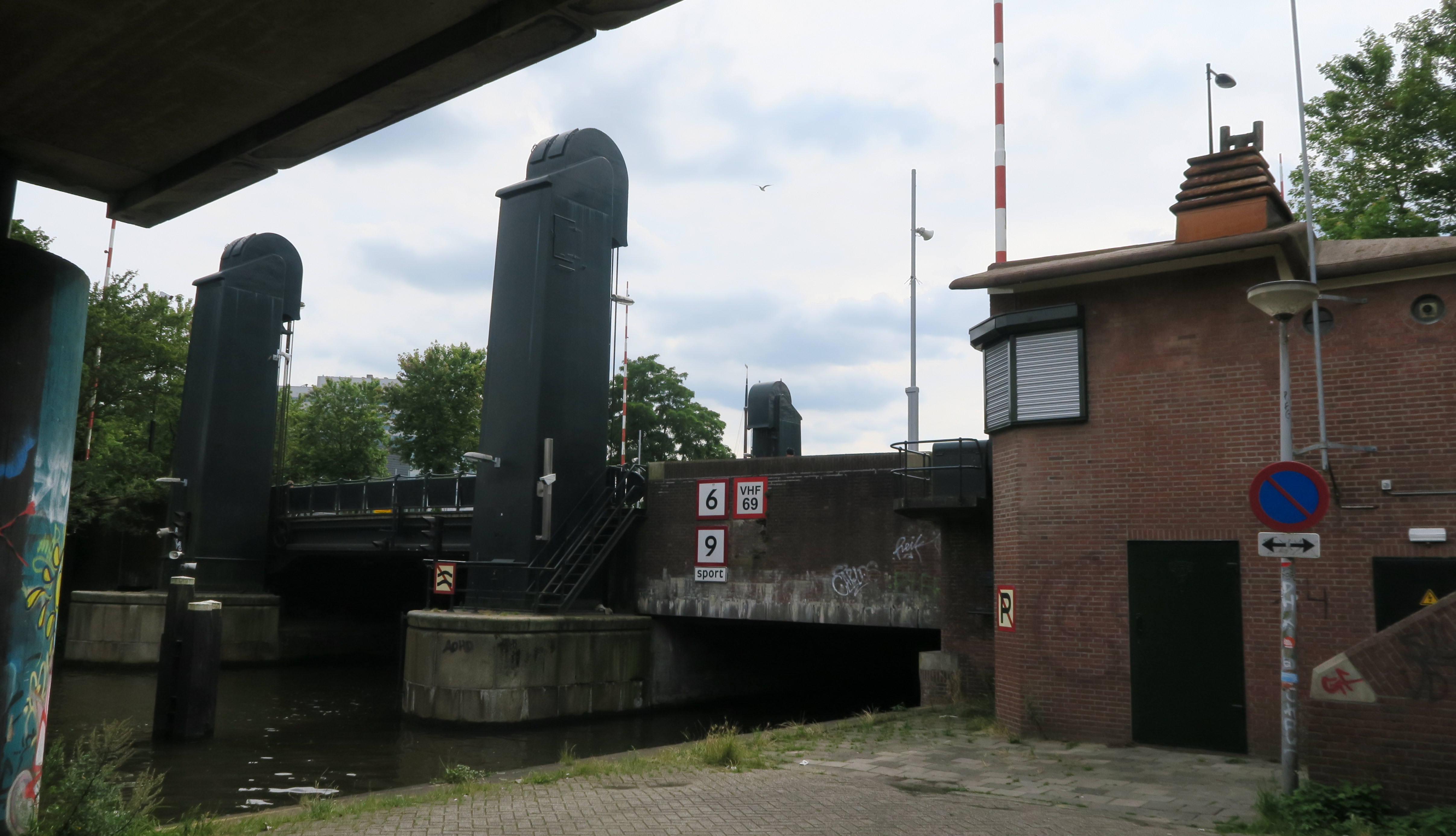 De Omvalbrug in Amsterdam, gezien naar het westen vanonder de spoorbrug